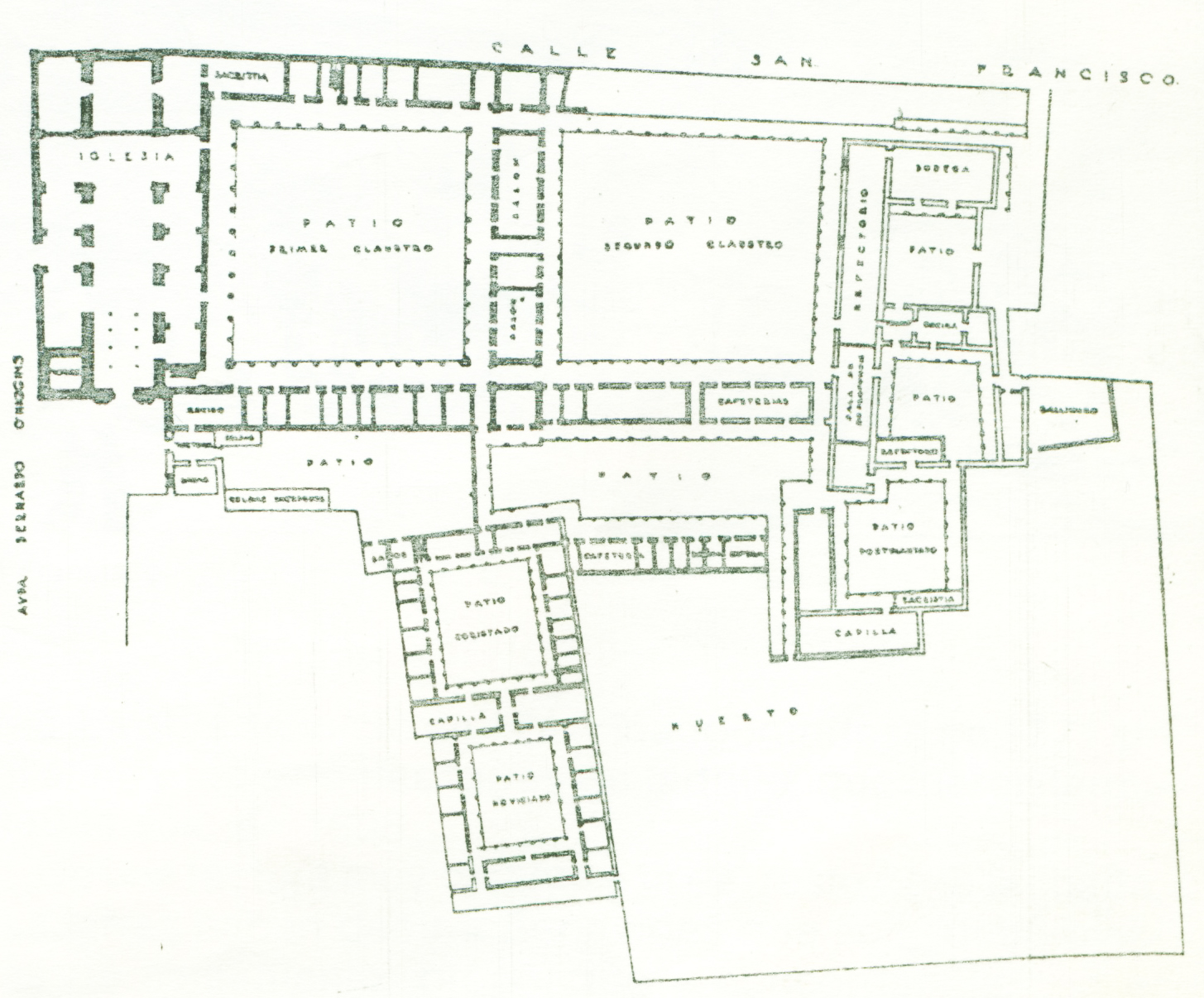 Planta Iglesia y Convento